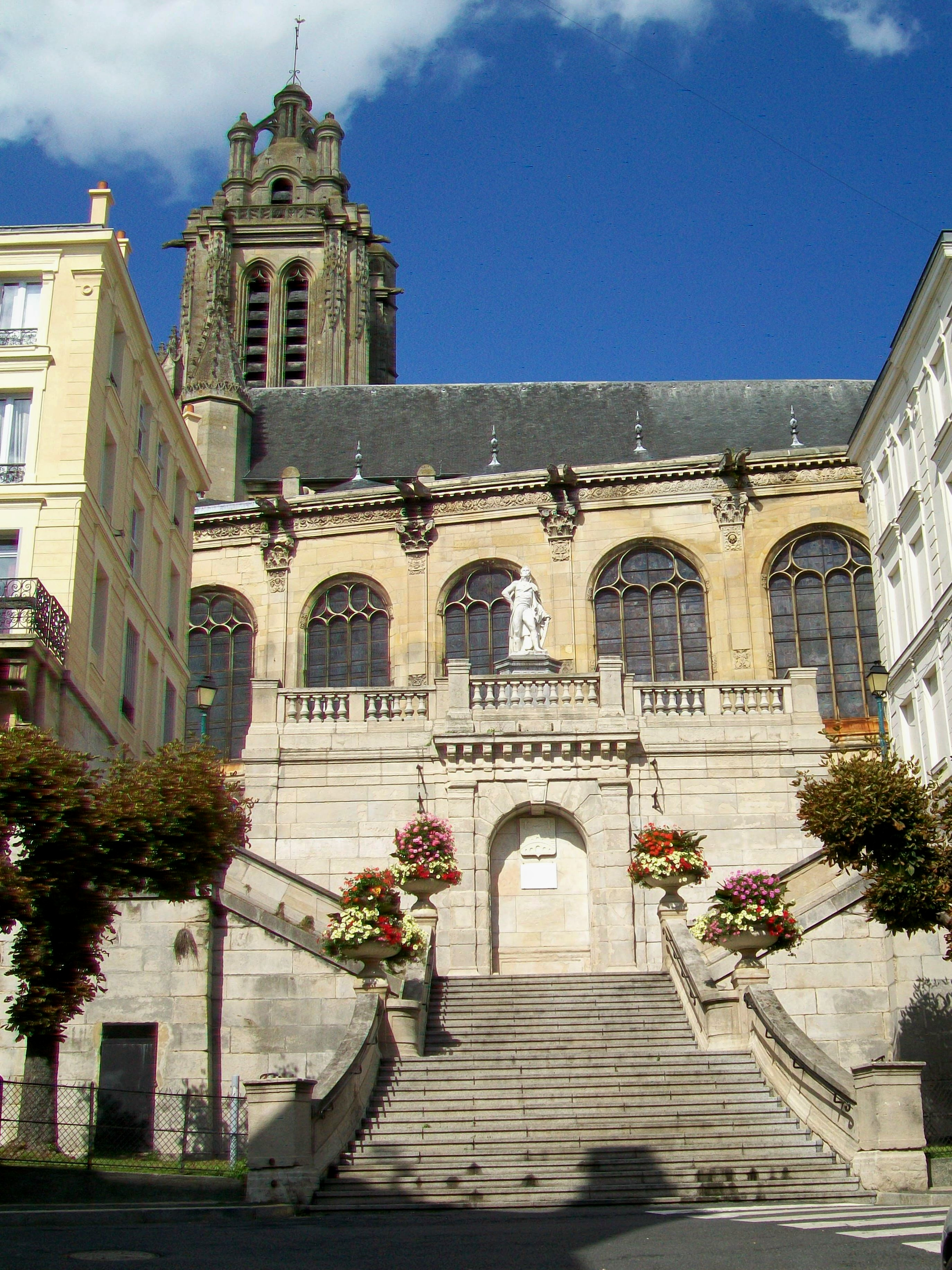 La cathédrale Saint-Maclou, depuis la rue Thiers au sud.